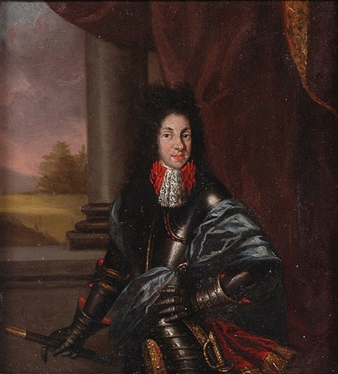 Ritratto di Eugenio Maurizio di Savoia (1635-1673)